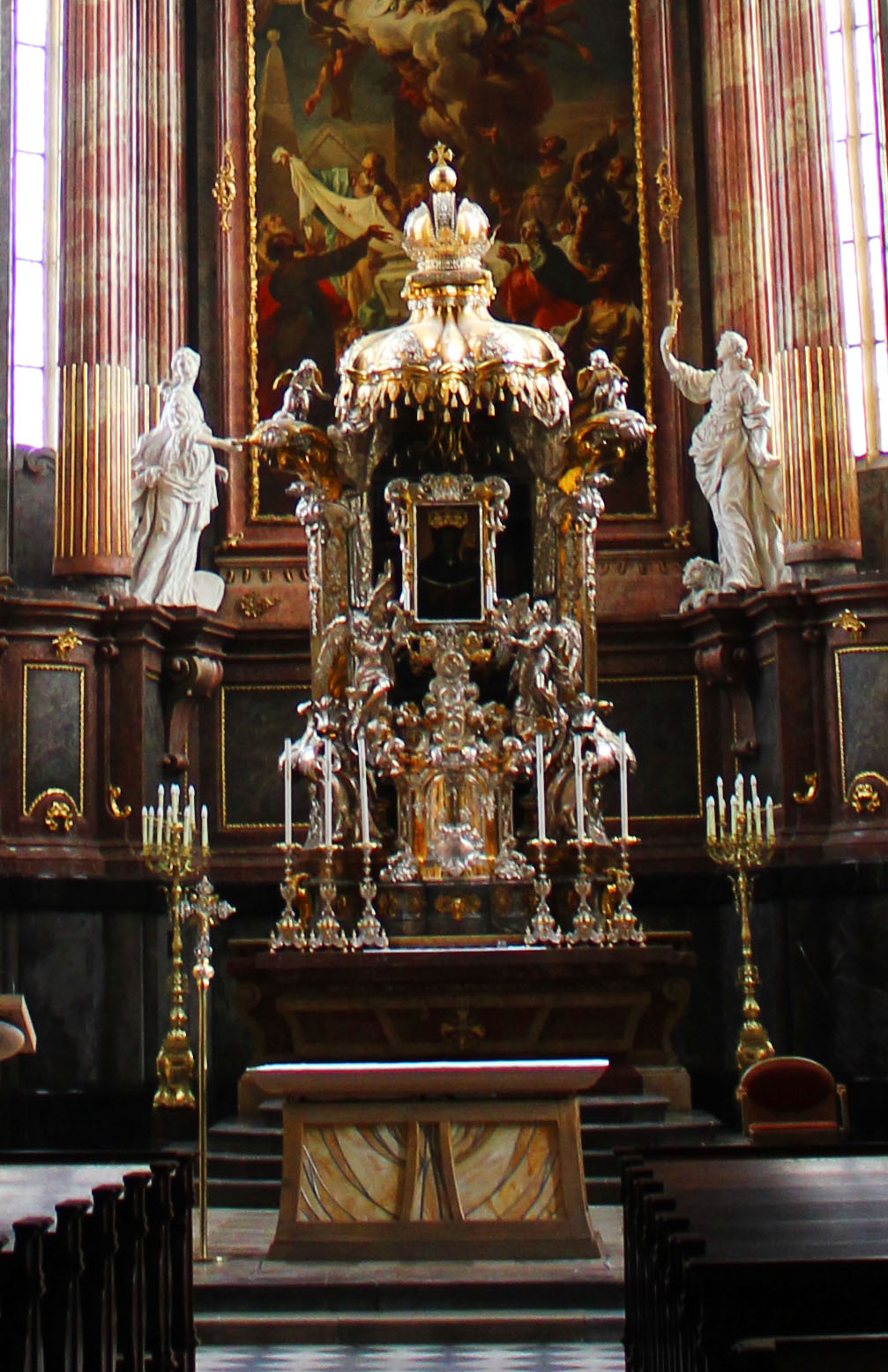 Oltář – autor: Johann Georg Herkommer Vznikl při příležitosti korunování palladia "Černé Madony" v roce 1736, obraz je důstojně umístěn ve středu oltáře. Sám oltář je považovaný za nejvýznamnější stříbrnickou práci na území Moravy. Jeho konstrukce i opláštění je pozlaceno mědí a stříbrným plechem.